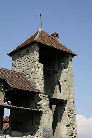 Payerne: einer der Türme der mittelalterlichen Stadtanlage